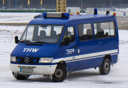 Drift nach Berabfahrt II